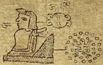 The Tepanec ruler Tezozomoc.